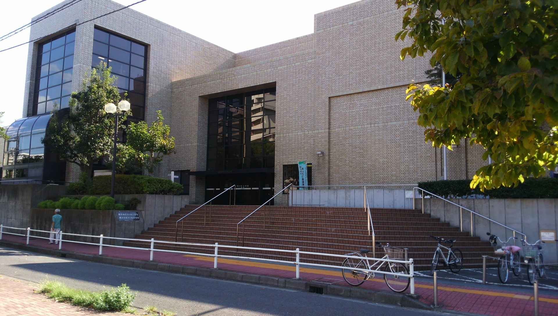 神奈川県横浜市保土ヶ谷区星川にある、保土ヶ谷図書館（左側）および公会堂（右側）。